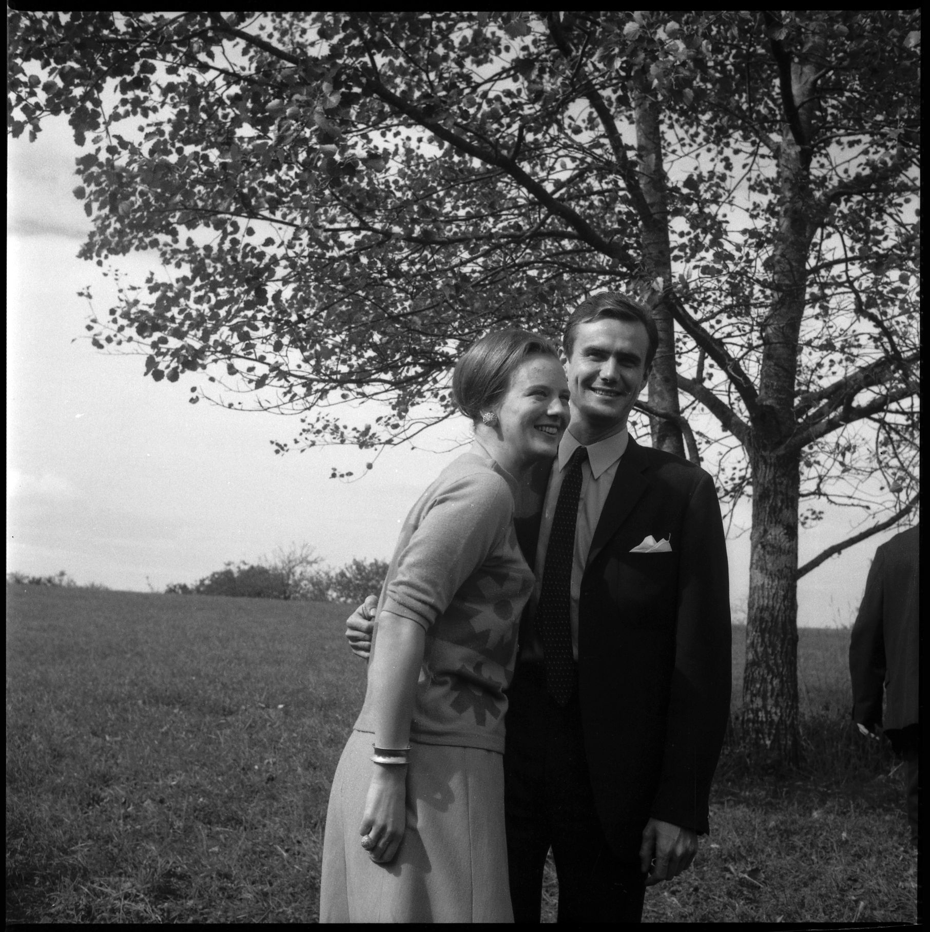 Dans le Lot. 12-16 Octobre 1966. Vue du couple princier du Danemark posant dans la campagne lotoise.